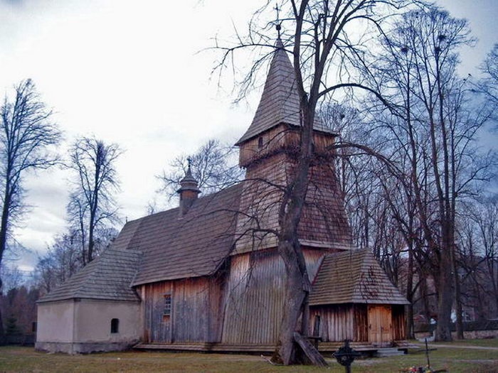 Białka Tatrzańska - kościół drewn. p.w. śś. Szymona i Judy